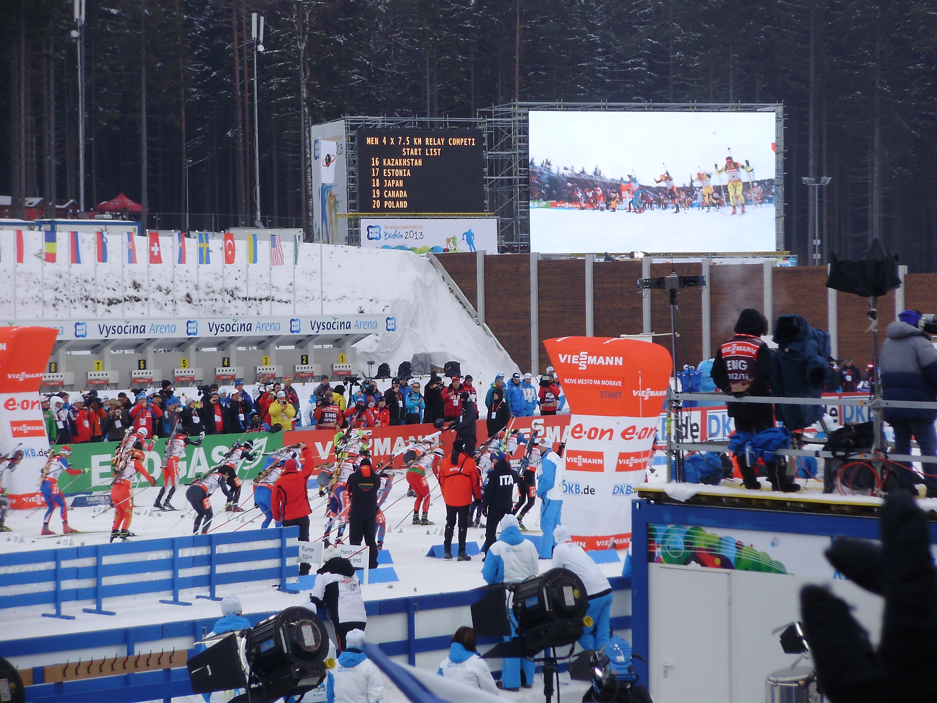 MS v Biatlonu 2013 - štafety muži